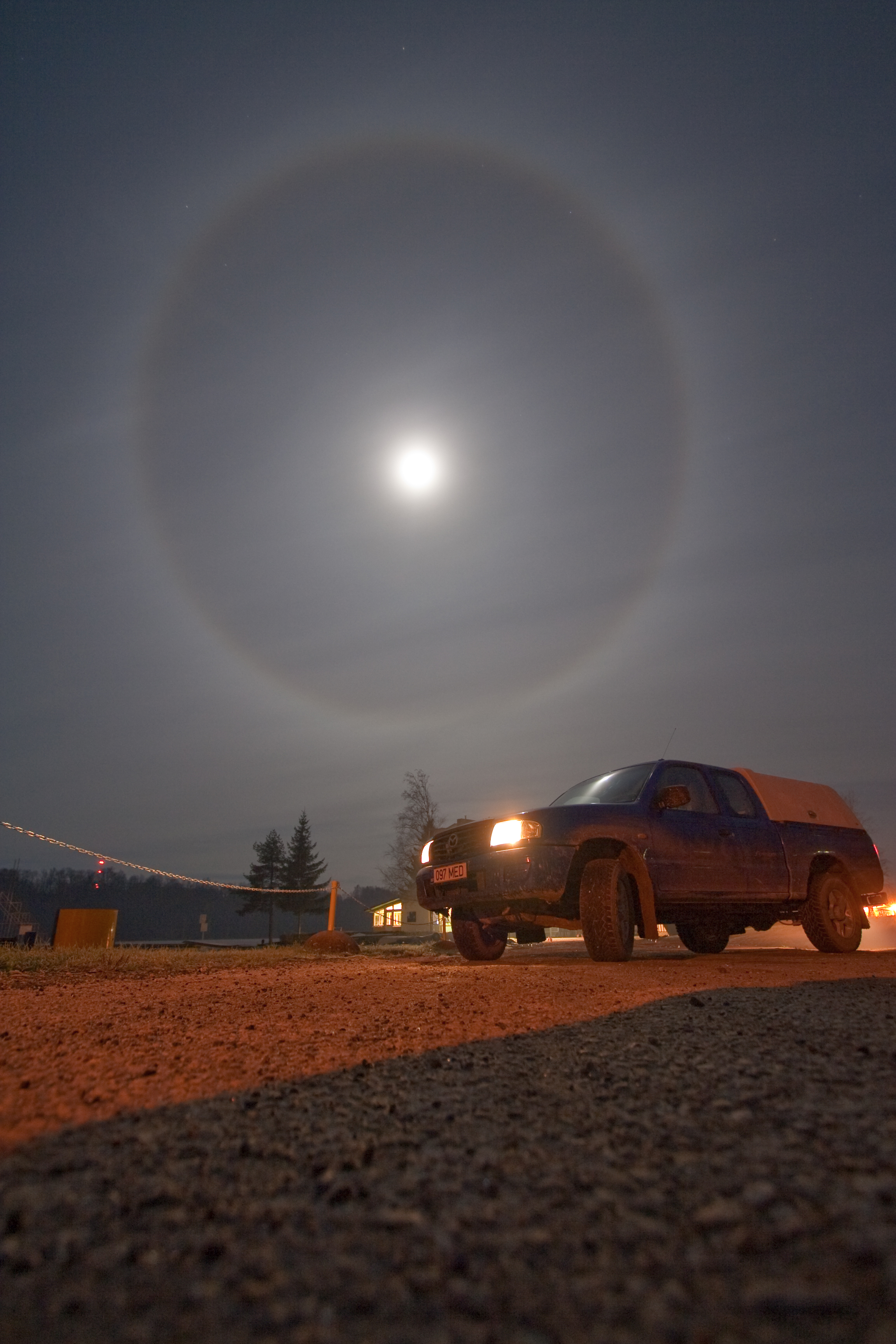 Halo around the Moon